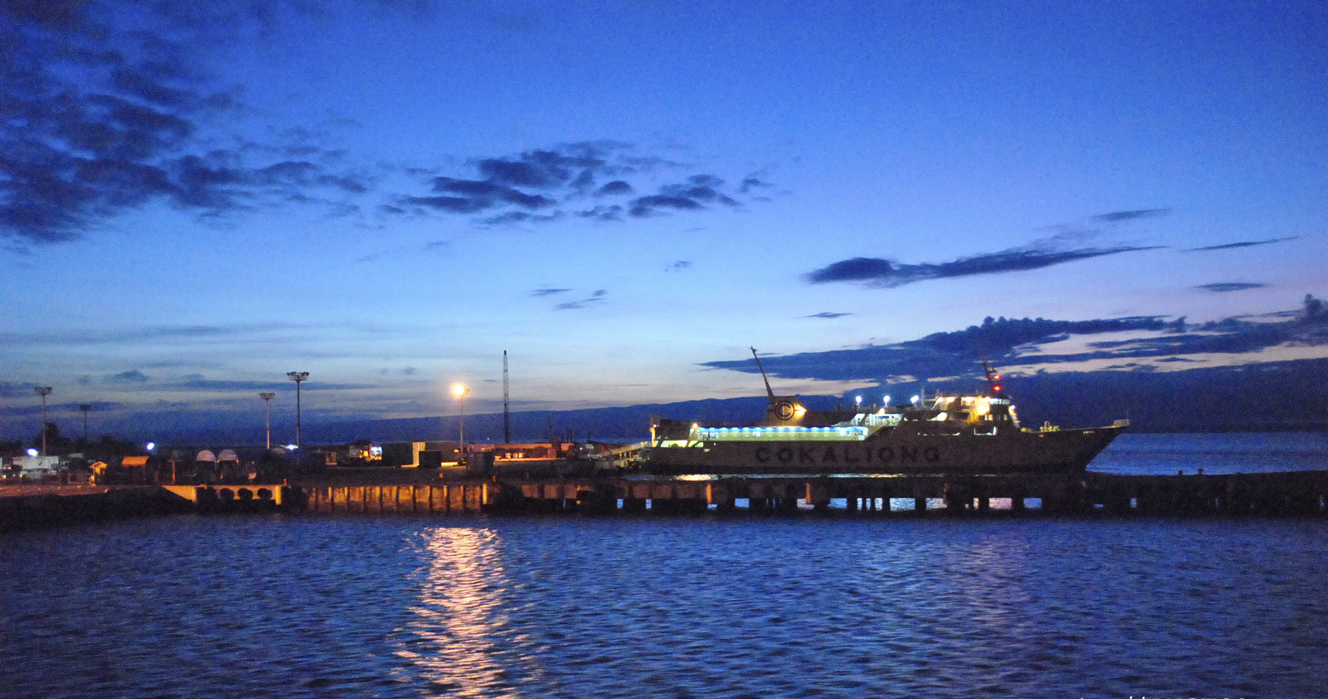 Ozamiz port, Philippines